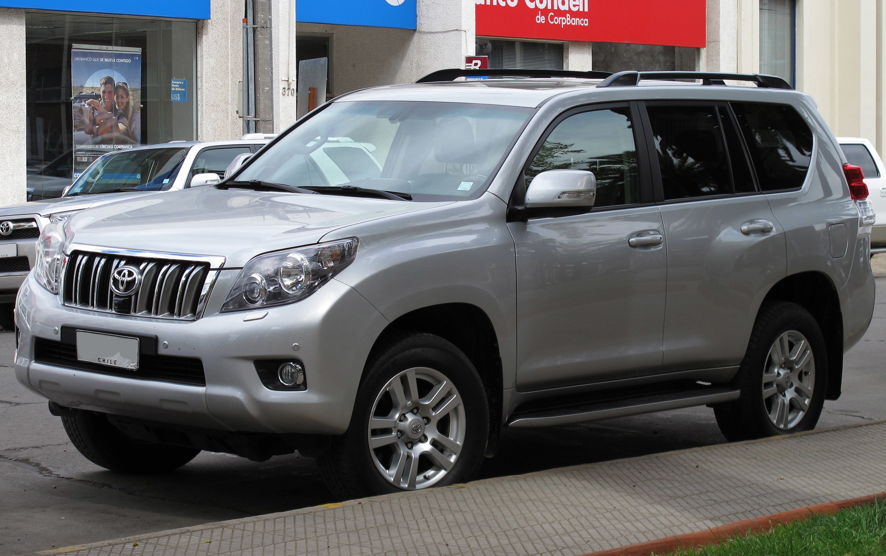 Toyota Land Cruiser Prado 4.0 VX 2012